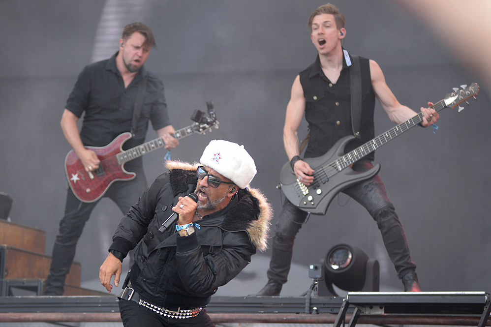 Le leader Alexx Wesselsky du groupe allemand Eisbrecher au hellfest 2019